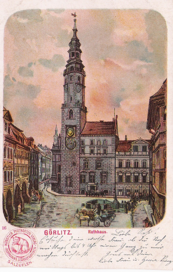 Deutschland, Nordrhein-Westfalen, Kreis Lippe, Bad Salzuflen: Postkarte der ehemaligen Hoffmann’s Stärkefabriken, Görlitzer Rathaus